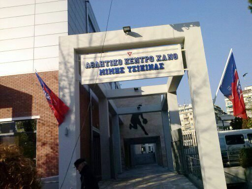 Το αθλητικό κέντρο ΜΙΜΗΣ ΤΣΙΚΙΝΑΣ στην ΧΑΝ ΘΕΣΣΑΛΟΝΙΚΗΣ